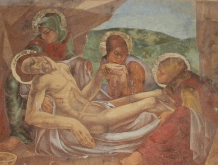 Detalj s freske Joze Kljakovića u arkadama na zagrebačkom Mirogoju